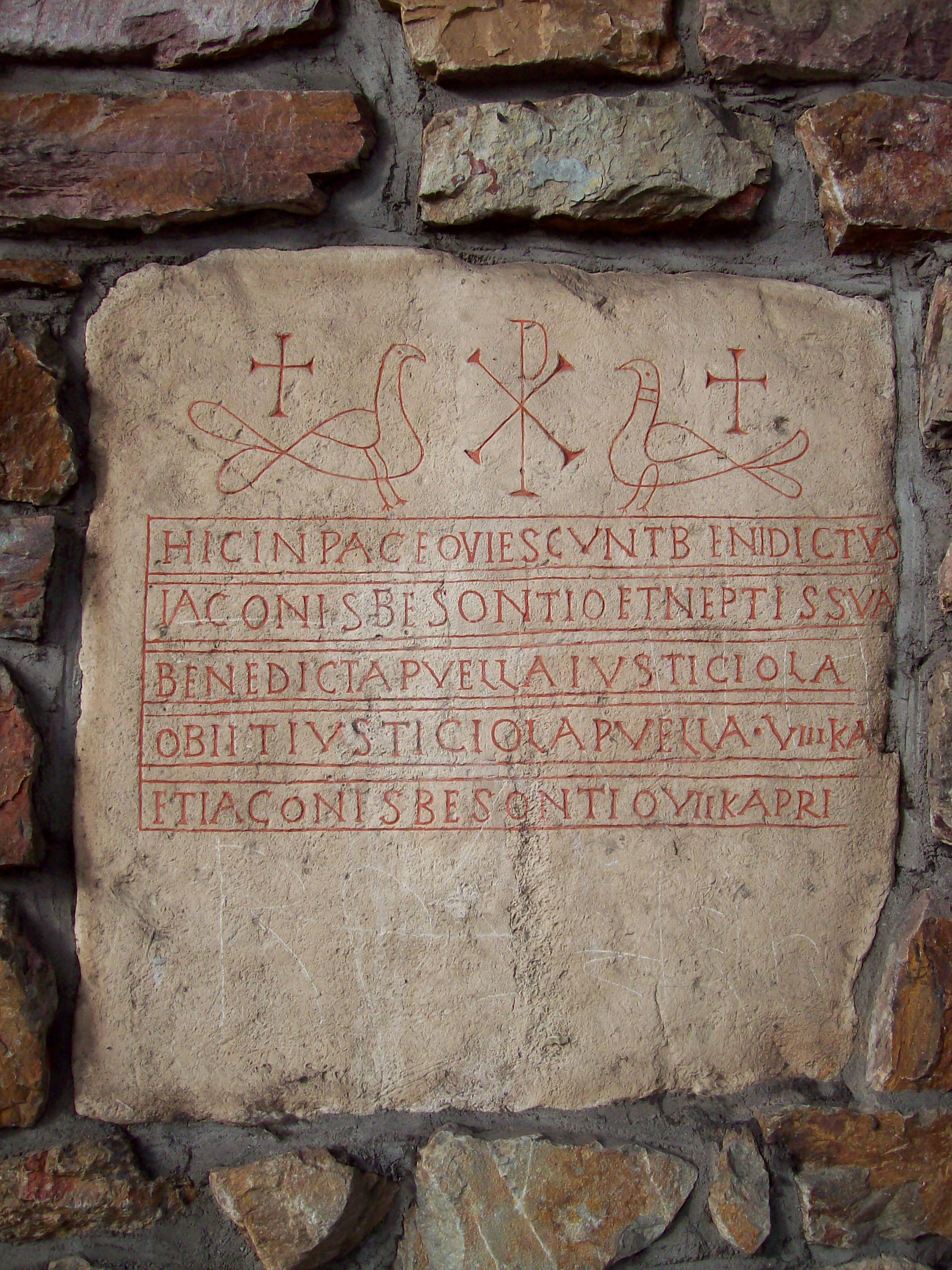 Nachbildung des Grabstein des Diakons Besontio in Boppard; Das original befindet sich in der Pfarrkirche St. Severus in Boppard.